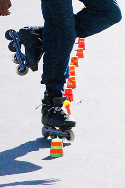 Inline skating